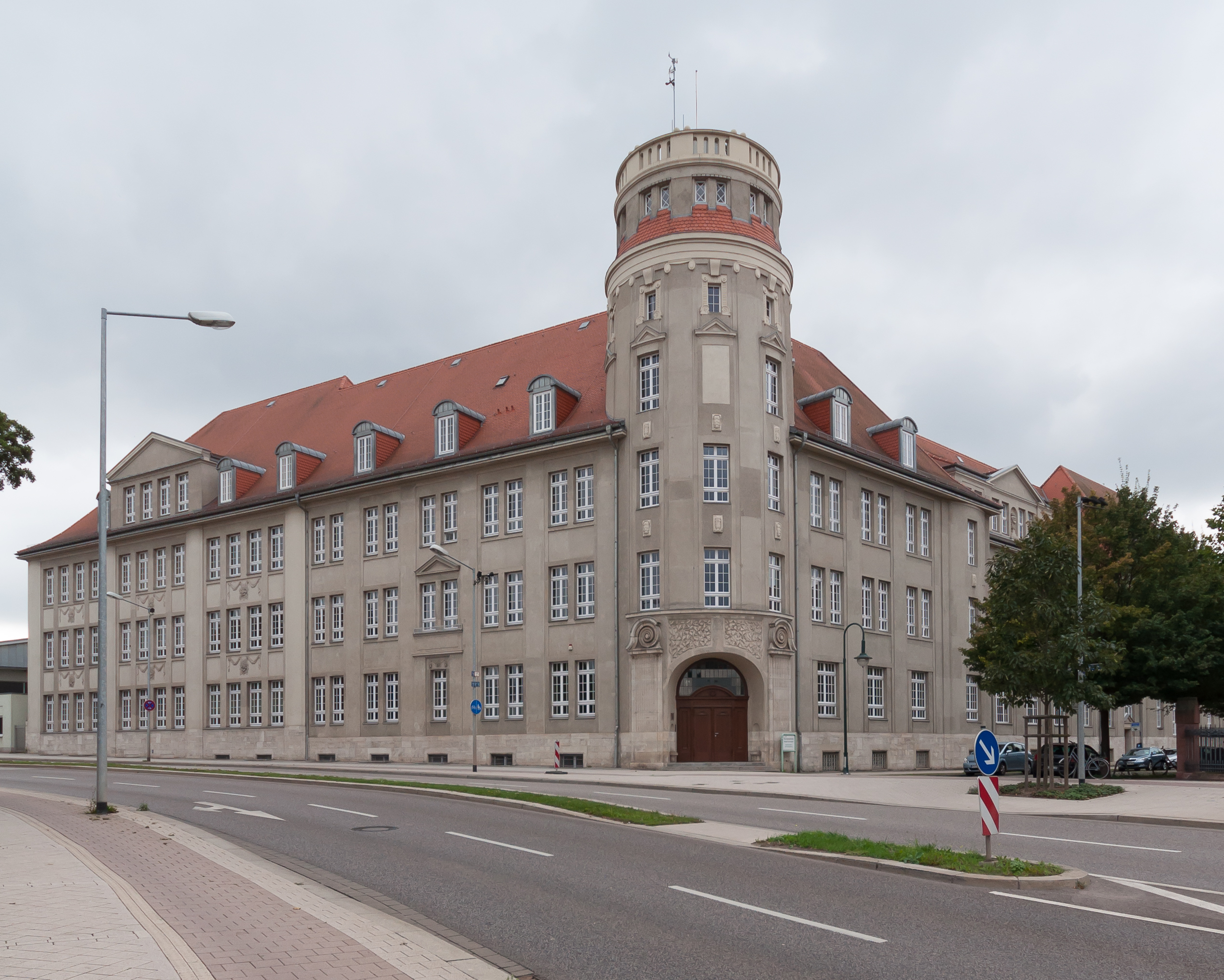 Hegel-Gymnasium in Magdeburg-Altstadt. This is a photograph of an architectural monument.It is on the list of cultural monuments of Magdeburg